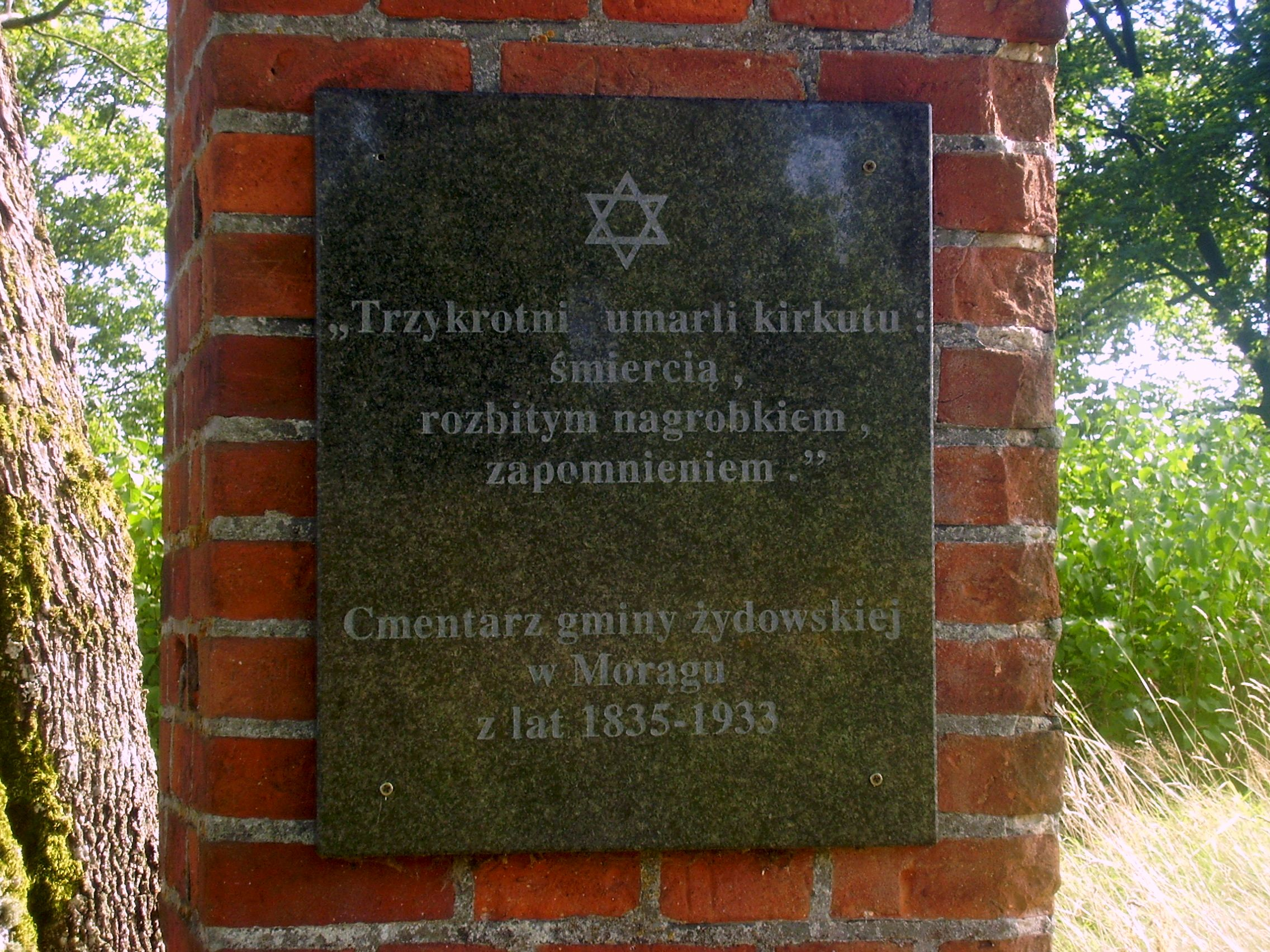 Kirkut w Morągu tablica informacyjna